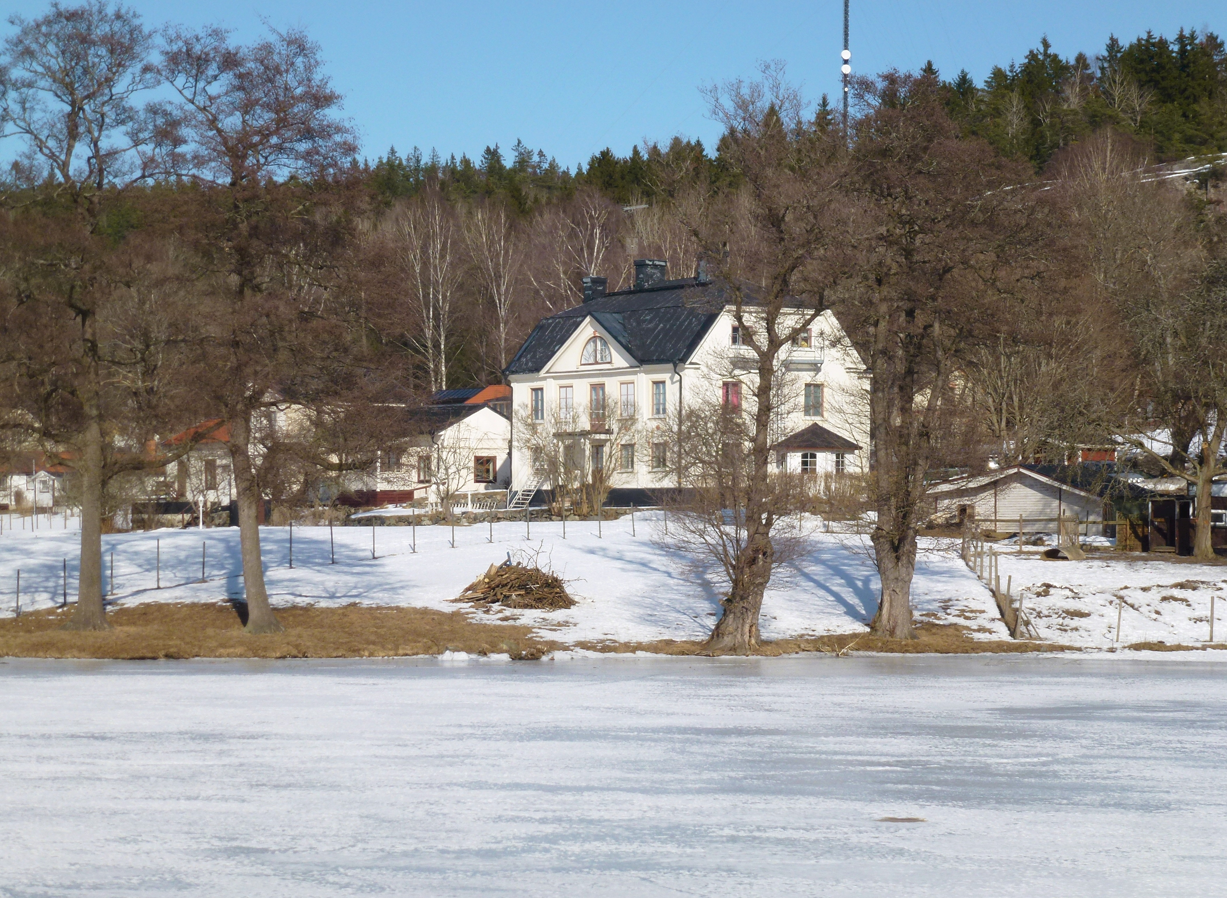 Ranghildsborgs gård